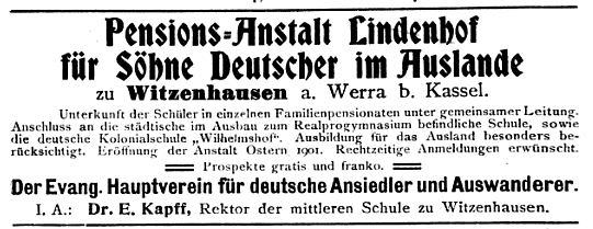 Anzeige von Ernst Kapff in: Deutsches Kolonialhandbuch 2. Auflage Bd. 1, 1901, S. 414